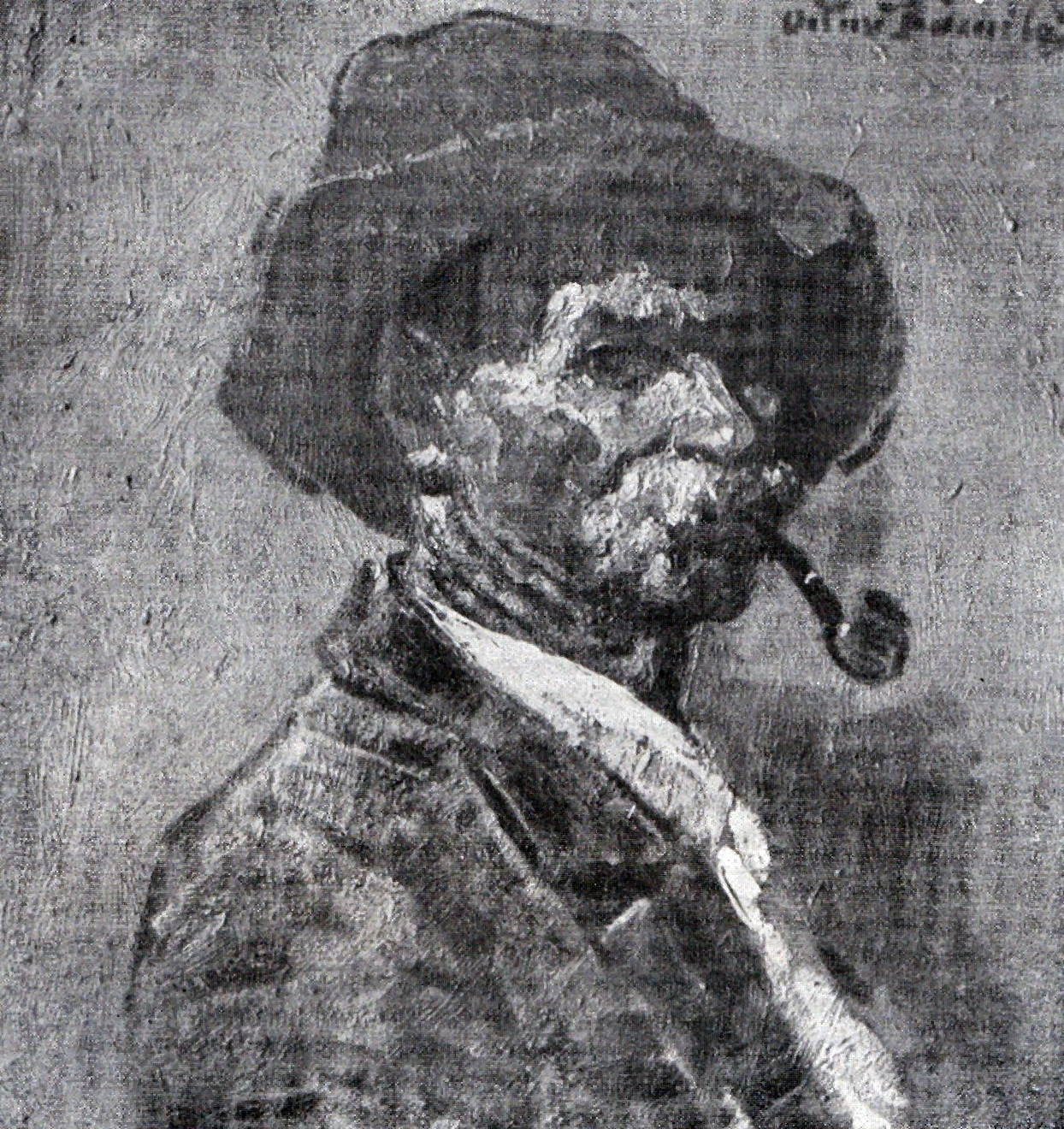 Muncitor